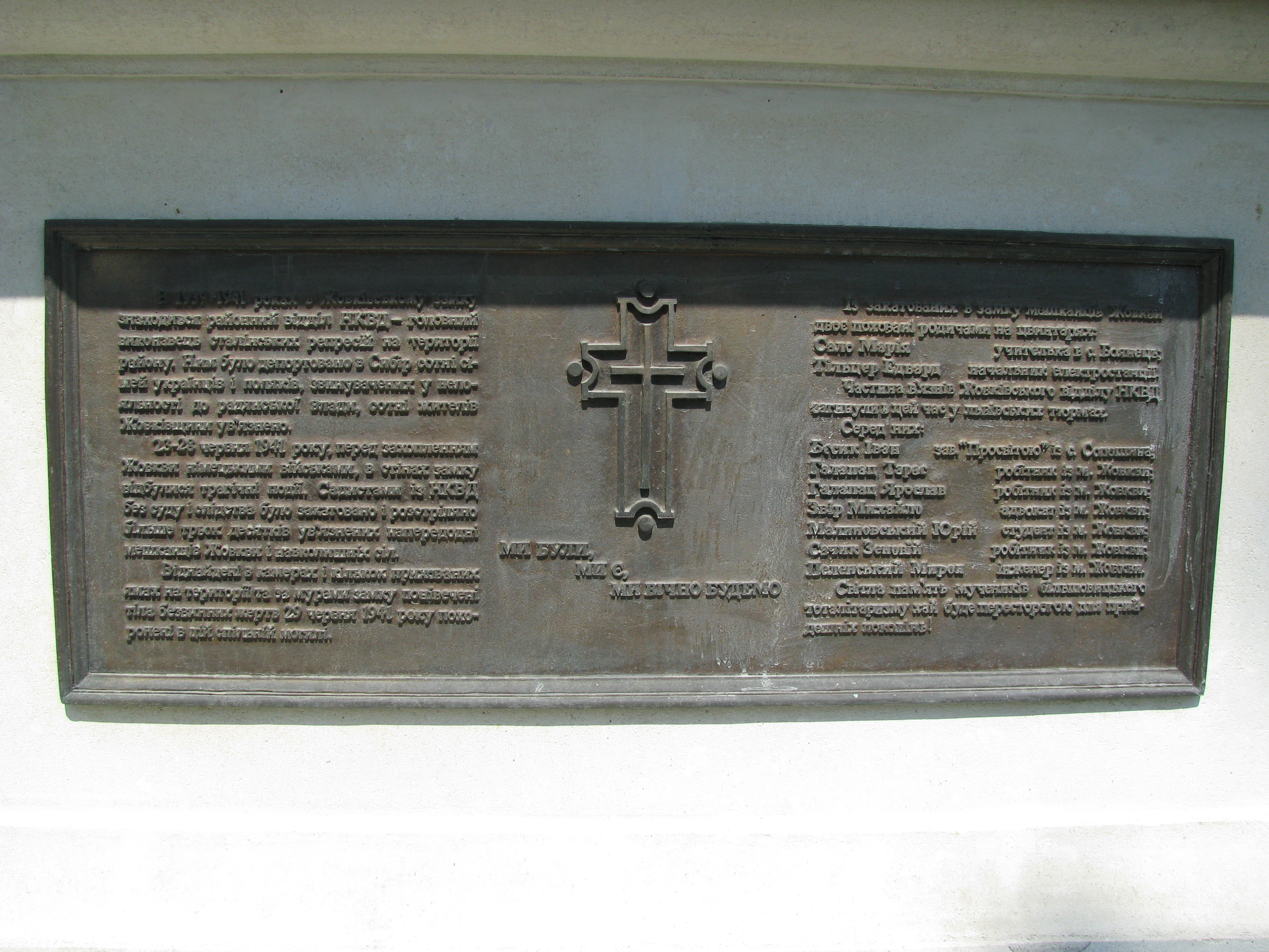 Замок Жолкевських(мур.), Жовква, пл.Вічева, 2